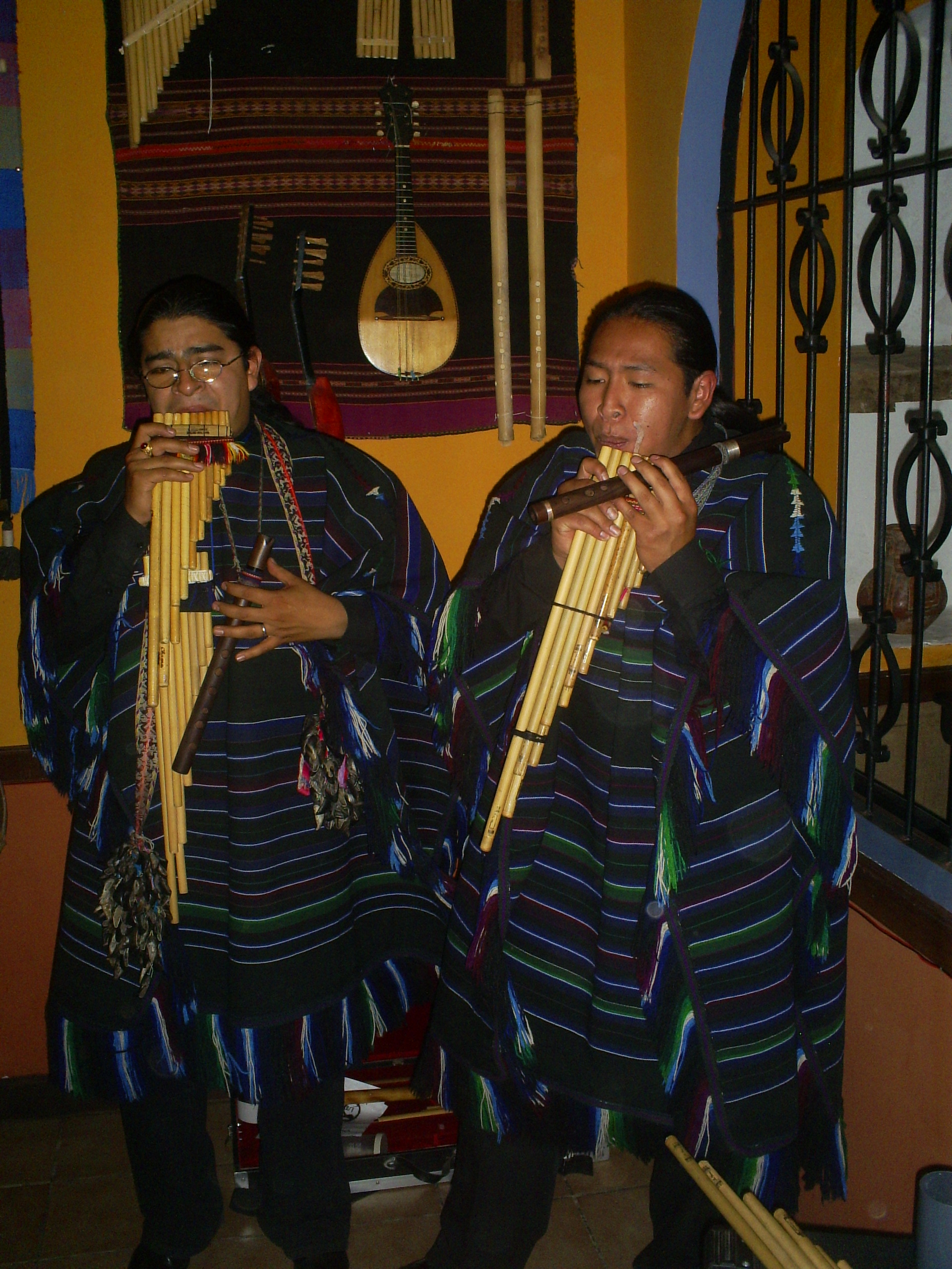 Ejecución del Siku por indígenas de Bolivia